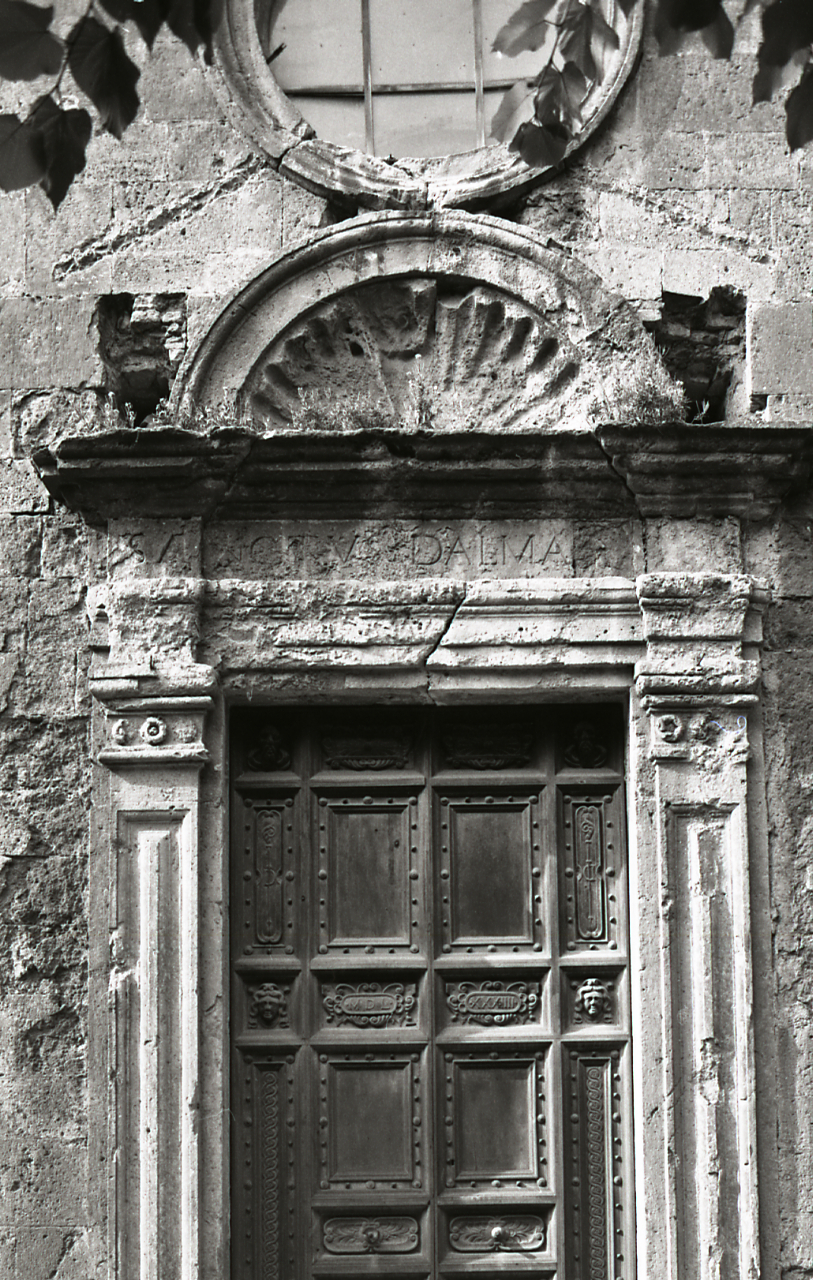 Servizio fotografico : Volterra, 1980 / Paolo Monti. - Strisce: 3, Fotogrammi complessivi: 18 : Negativo b/n, gelatina bromuro d'argento/ pellicola ; 35 mm. - ((Sul portanegativi: N[I]K[MA]T-EL FP4 iscrizione didascalica e documentaria manoscritta a pennarello nero "Volterra 2-19". - All'interno del portanegativi: la serie è anche identificata da una linea orizzontale a pennarello rosso che separa la suddetta serie dalla successiva di soggetto diverso e da un'iscrizione didascalica manoscritta a pennarello nero ("Volterra") in corrispondenza dei fotogrammi che compongono la serie. - (2):. - 2-7 = edifici non identificati;. - 8-19 = paesaggi e vedute di un castello non identificato su una altura. - Occasione: Documentazione del centro storico. - Fonte: Agenda di Paolo Monti: Nikon Leika 3001-/ Monti 1978 (1978-1982), presso Archivio Paolo Monti